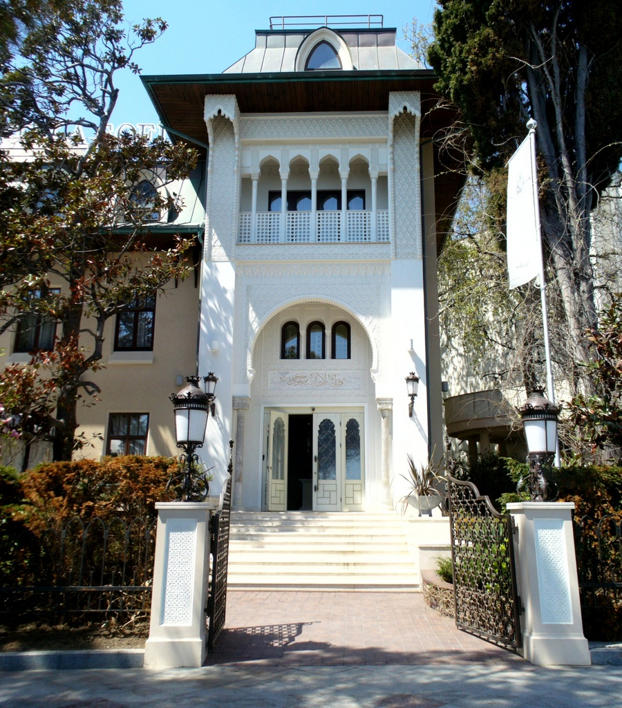 Колишня лікарня «Роффе», Ялта, наб. ім. В. І. Леніна, 31